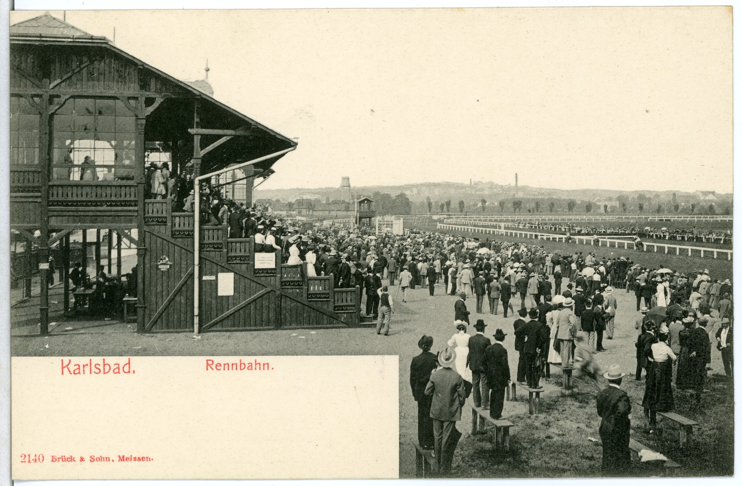 Karlsbad; Rennbahn This postcard is from publisher Brück & Sohn in Meißen ( This postcard has a unique number 02140 and is available in a higher resolution at the publisher. This images was uploaded in a cooperation project between Wikipedians and the publisher.